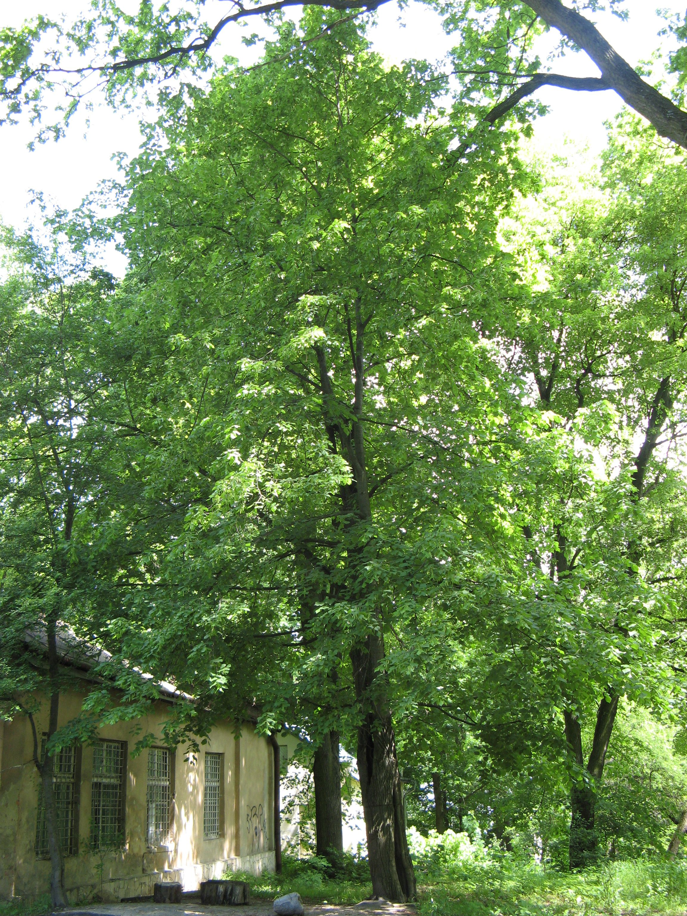 Липа американська. Львів, вул. Мушака, 54